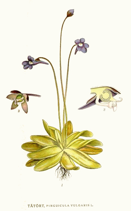 Pinguicula vulgaris L. Original Description Tätört, Pinguicula vulgaris L.